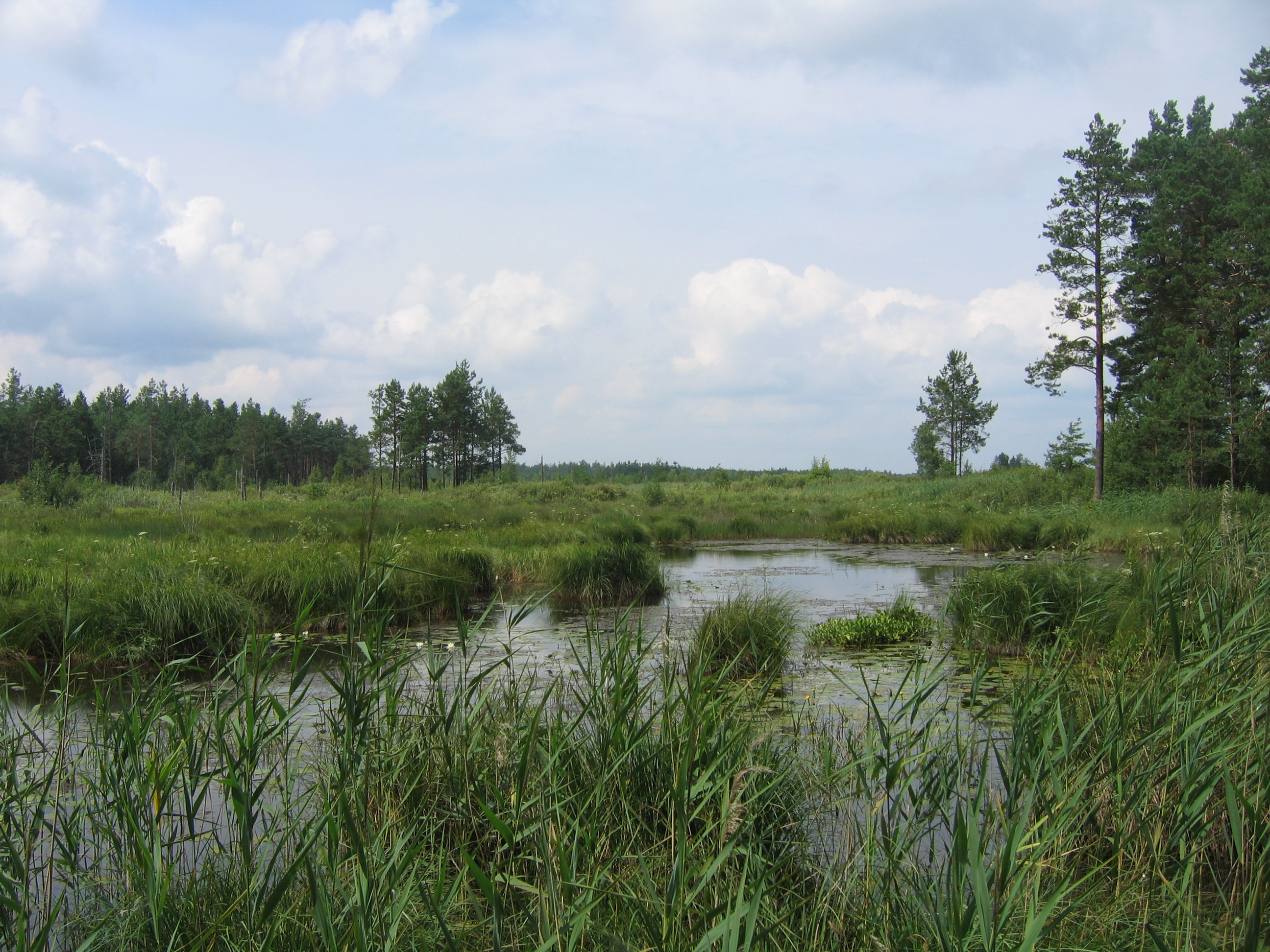 Поліський природний заповідник, Овруцький район, Селезівське лісництво